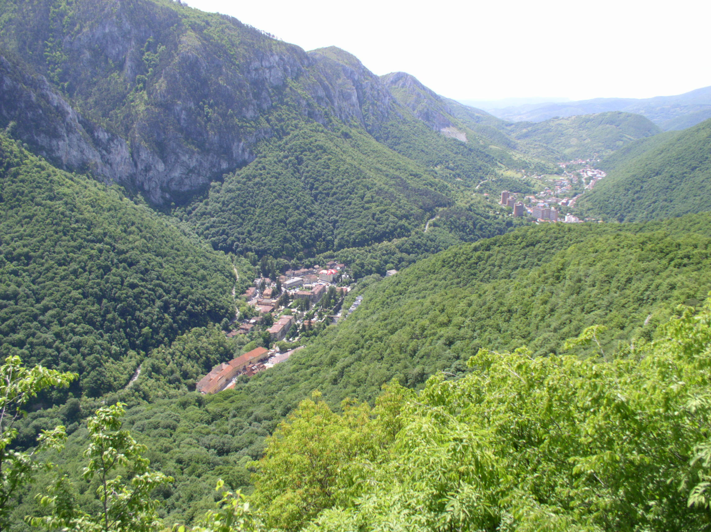 Bǎile Herculane vazut de la Foisorul Elisabeta